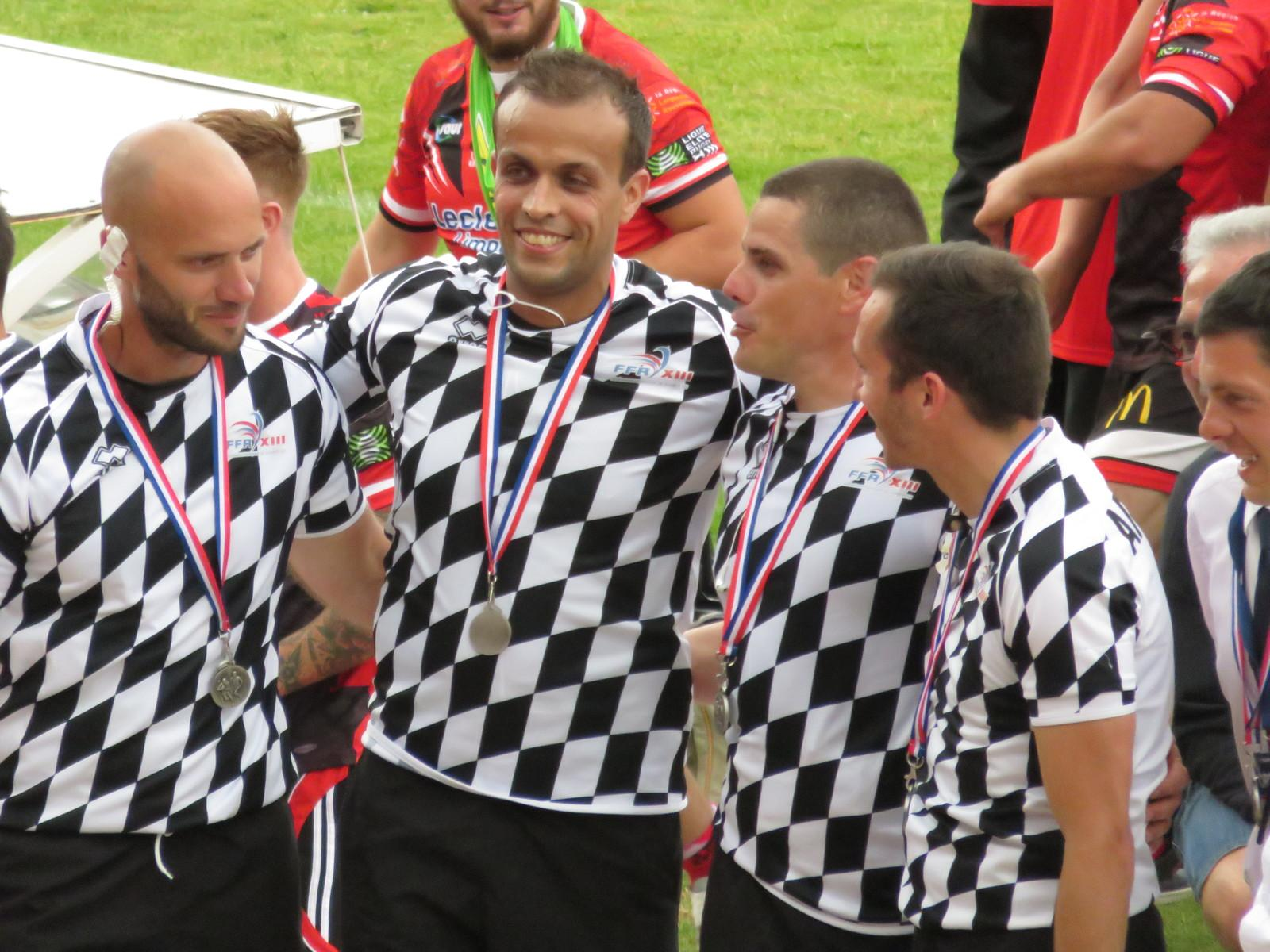 Arbitres lors de la finale du Championnat de France de rugby à XIII 2017 à Narbonne entre Limoux et Lézignan.